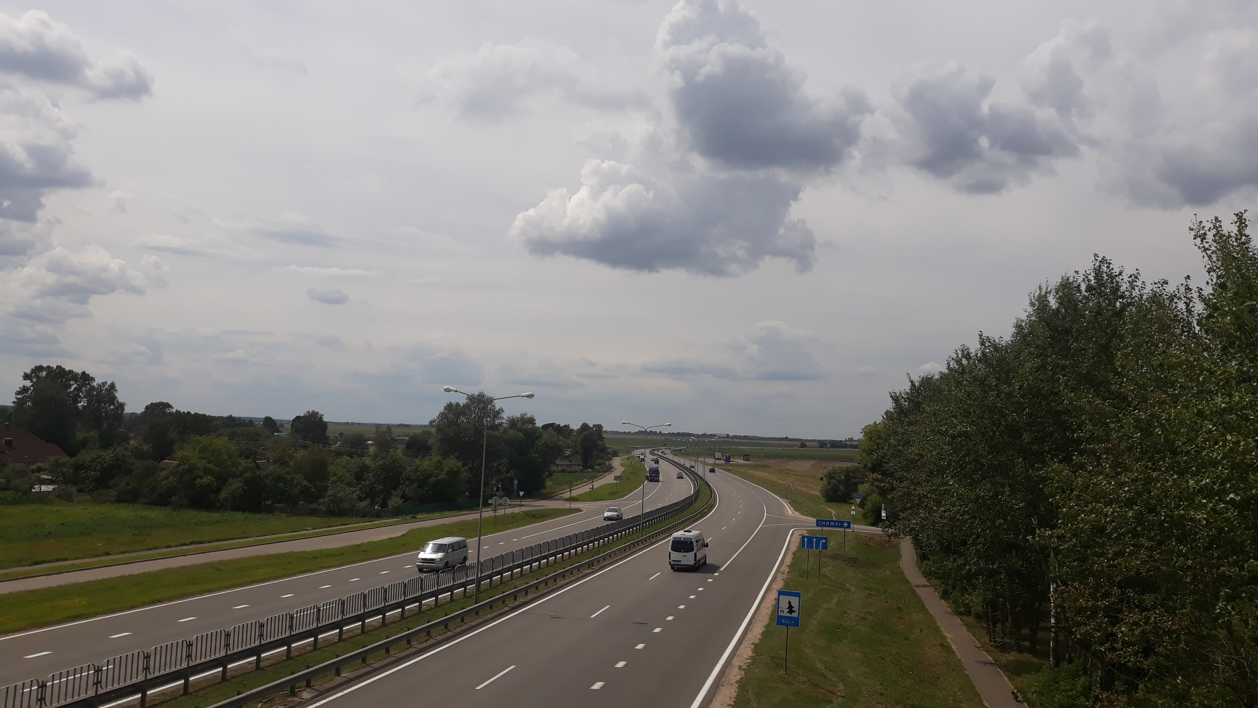 Магілёўская шаша ў Мінскі бок